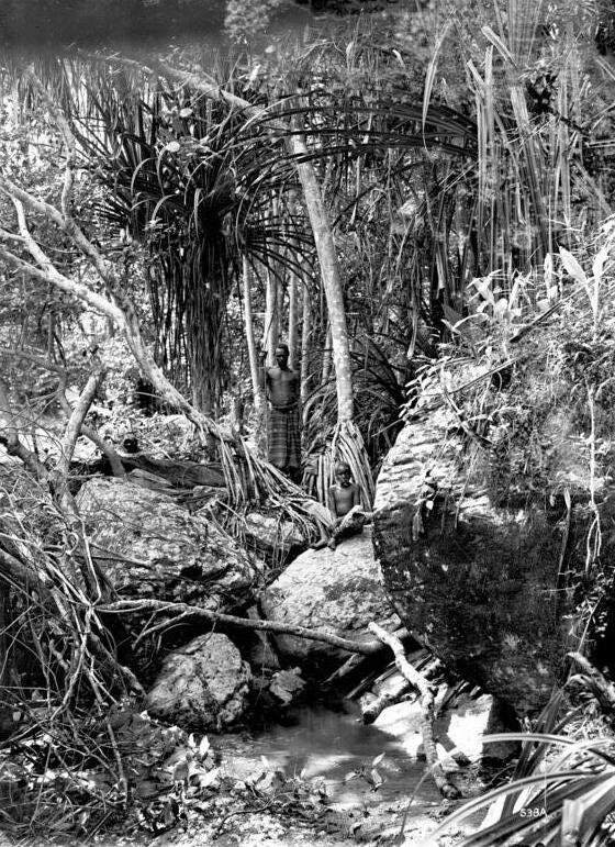 Urwald im Ulugurugebirge